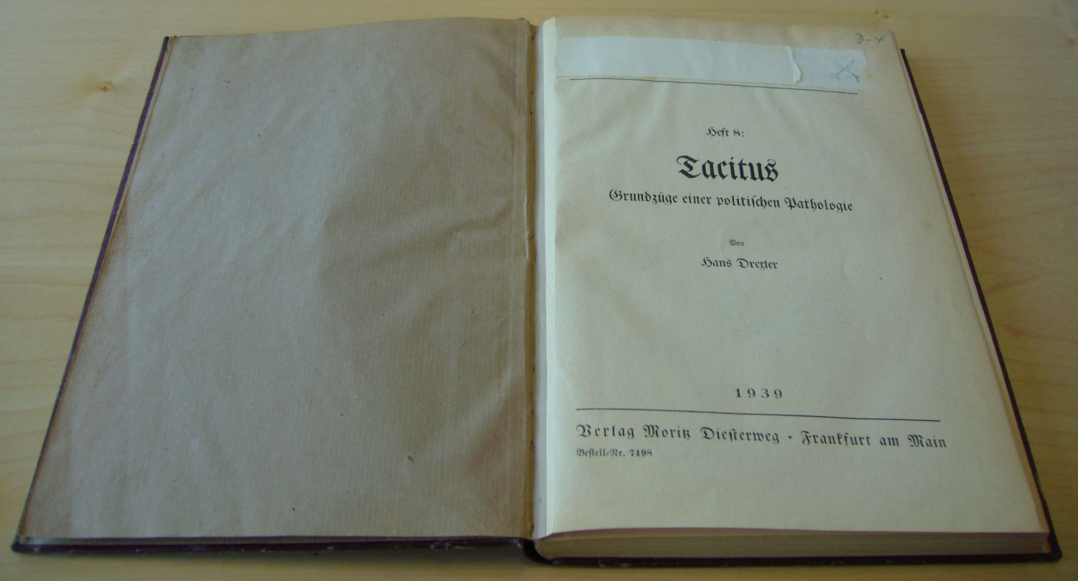 Titelblatt des Buchs Hans Drexler: Tacitus. Grundzüge einer politischen Pathologie, Frankfurt am Main 1939